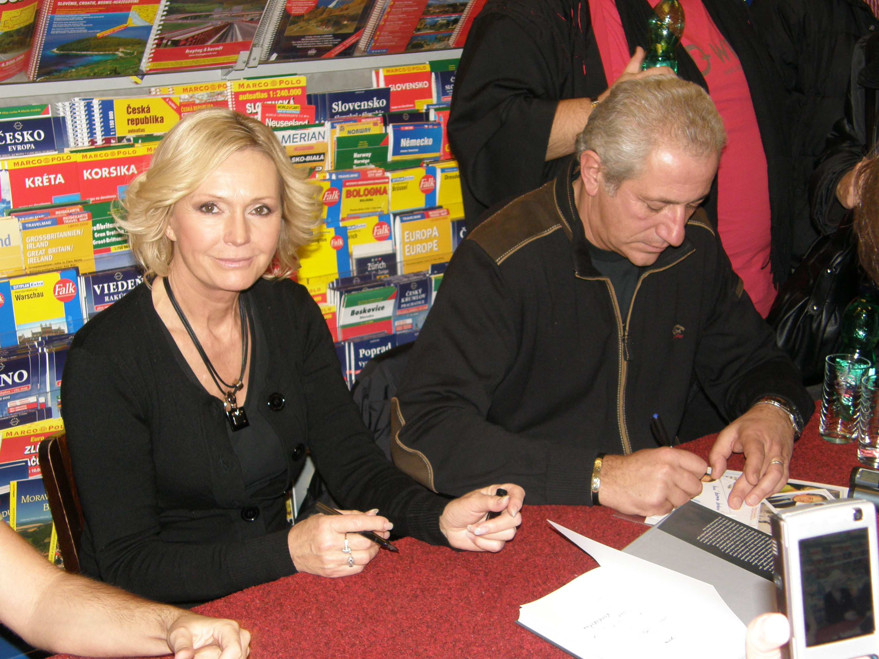 Helena Vondráčková a Martin Michal na autogramiádě ve Vaňkovce 10.12.2008